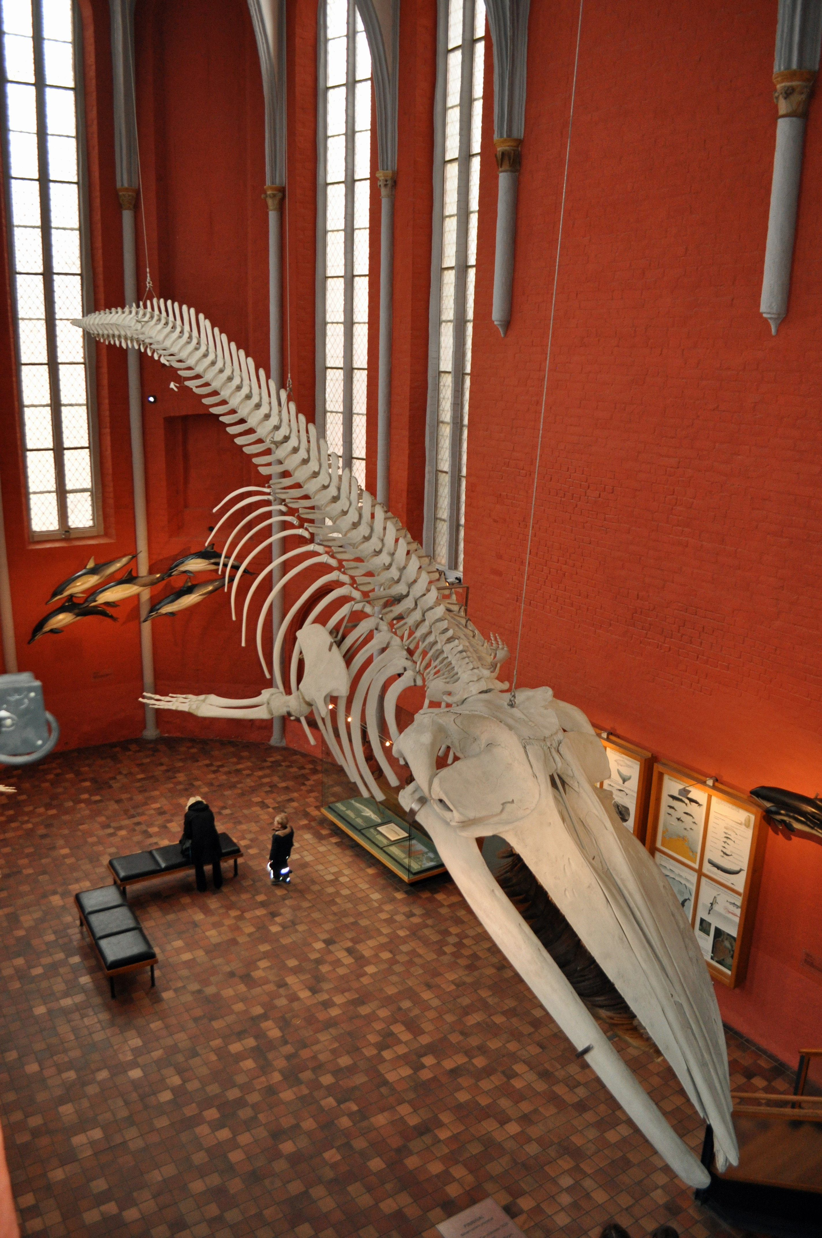 Stralsund, im Meeresmuseum (2013-02-13), by Klugschnacker in Wikipedia (46)